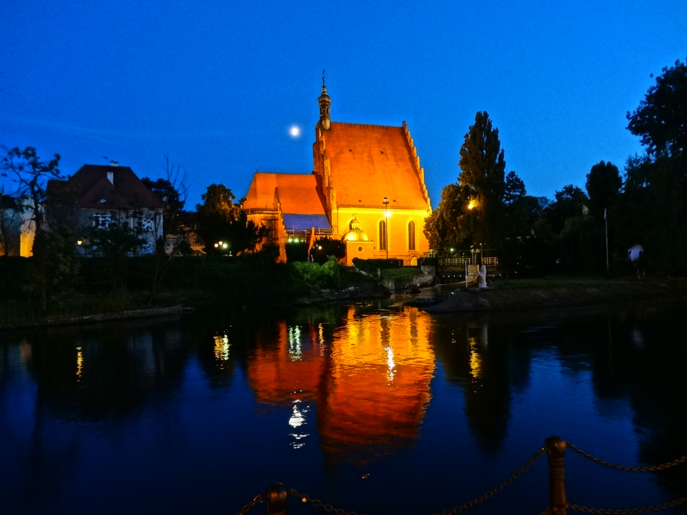 Katedra p.w. św. Marcina i Mikołaja w Bydgoszczy (XIV-XV wiek)